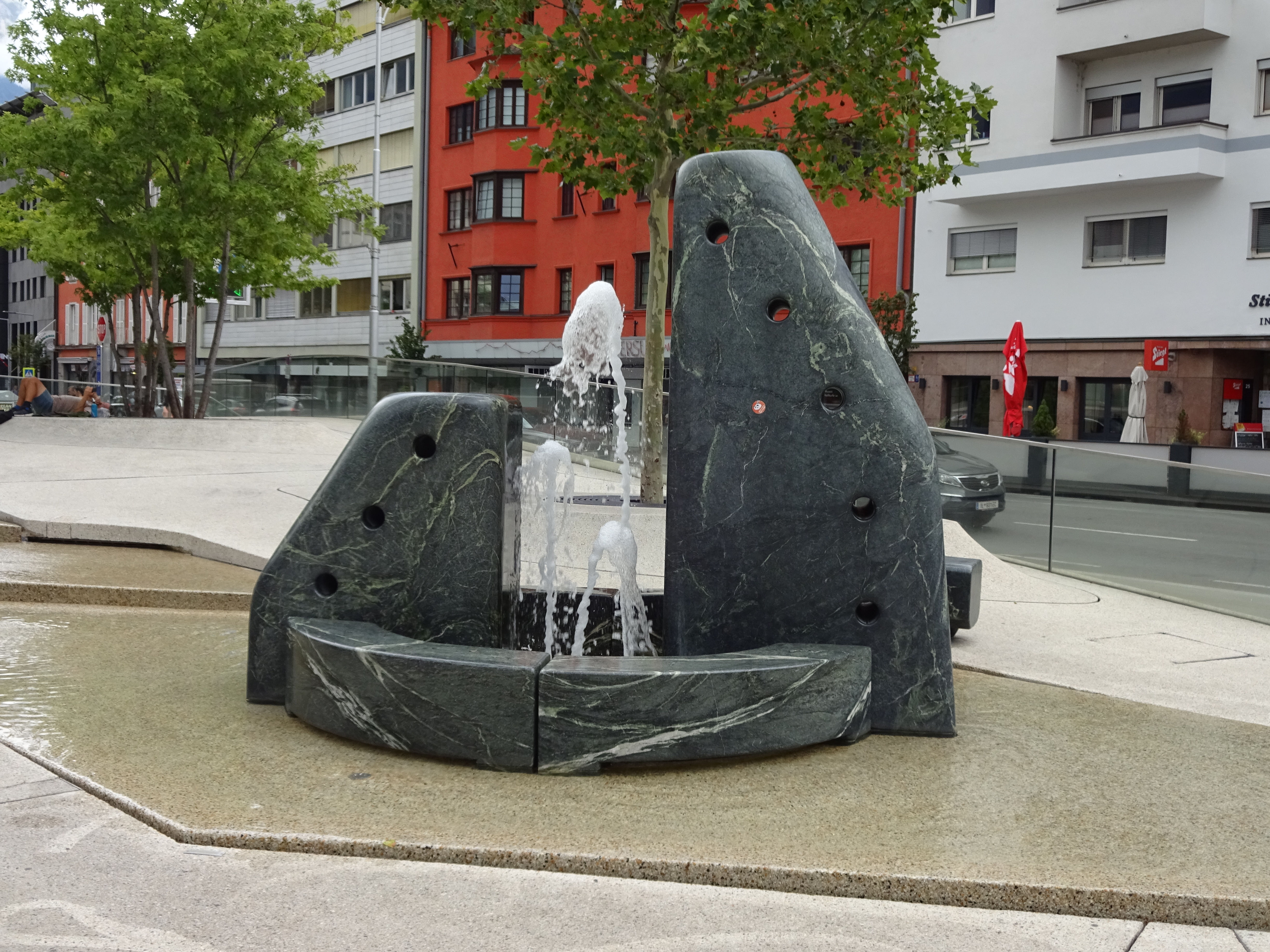 Neuer Vereinigungsbrunnen am Landhausplatz, Innsbruck This media shows the remarkable cultural object in the Austrian state of Tyrol listed by the Tyrolean Art Cadastre with the ID 22471. (on tirisMaps, pdf, more images on Commons)